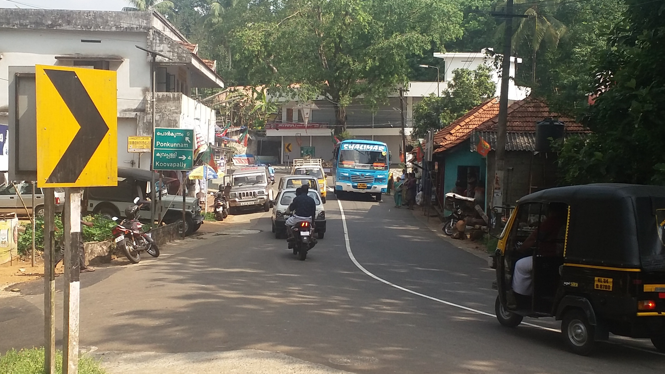 വിഴിക്കത്തോട് കവല